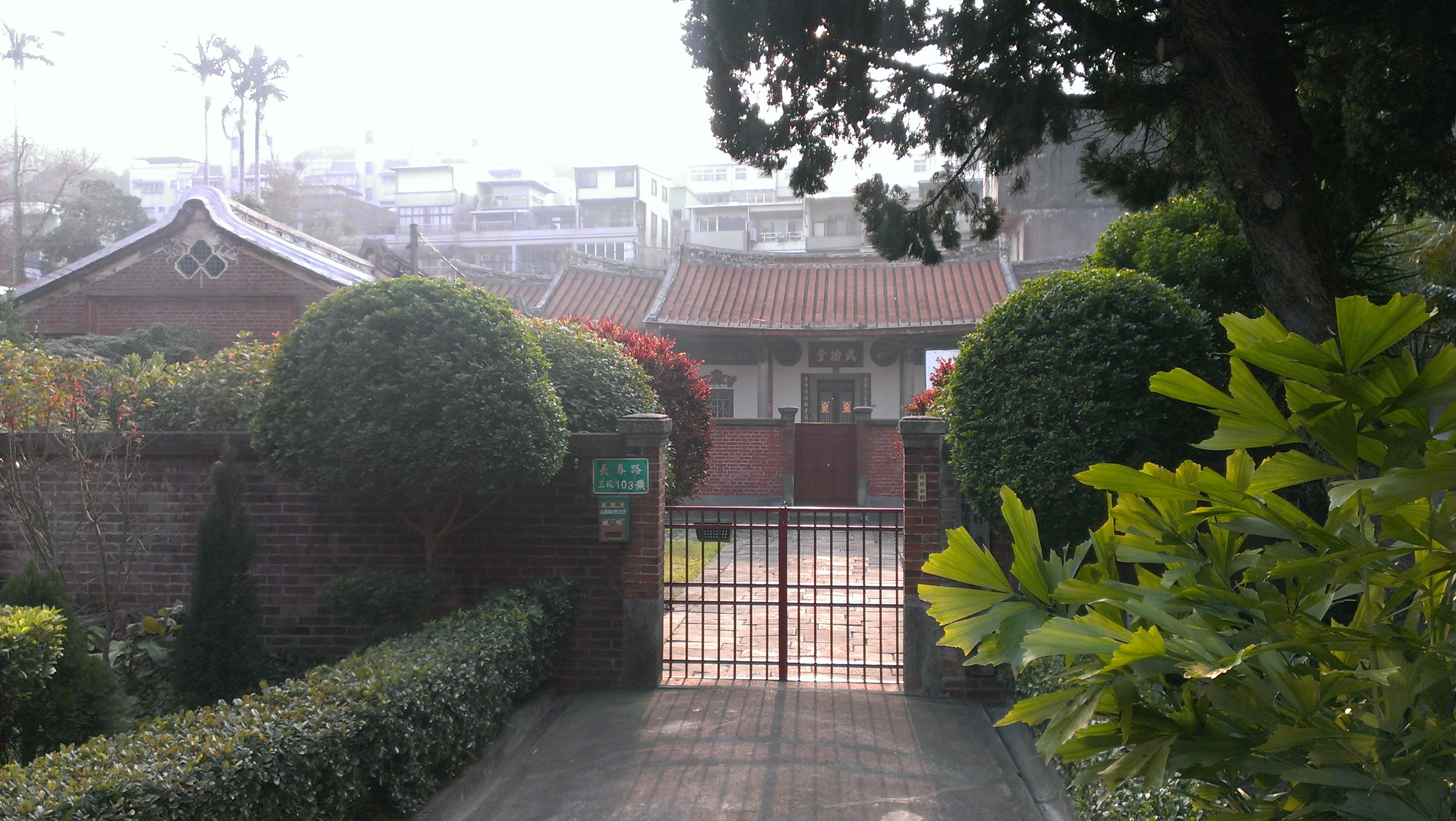 竹東鎮武功堂